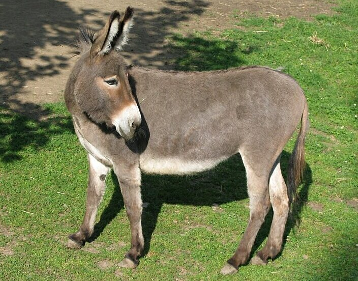 Osioł